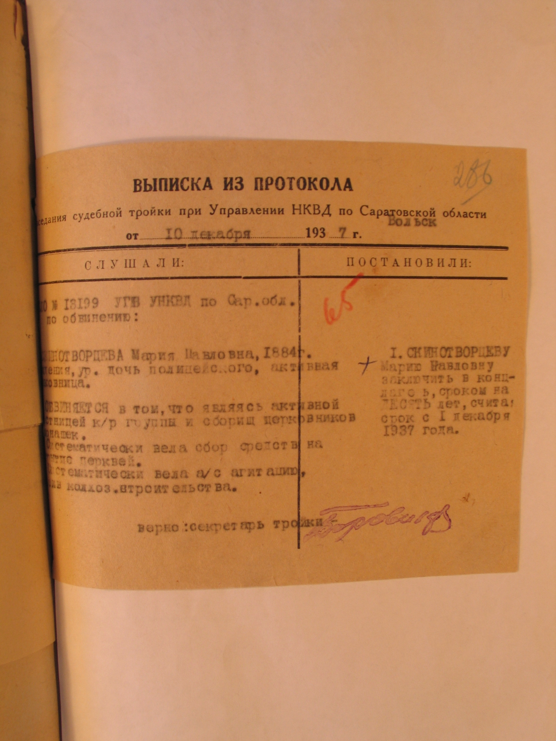 Выписка из протокола Хвалынского РО УНКВД